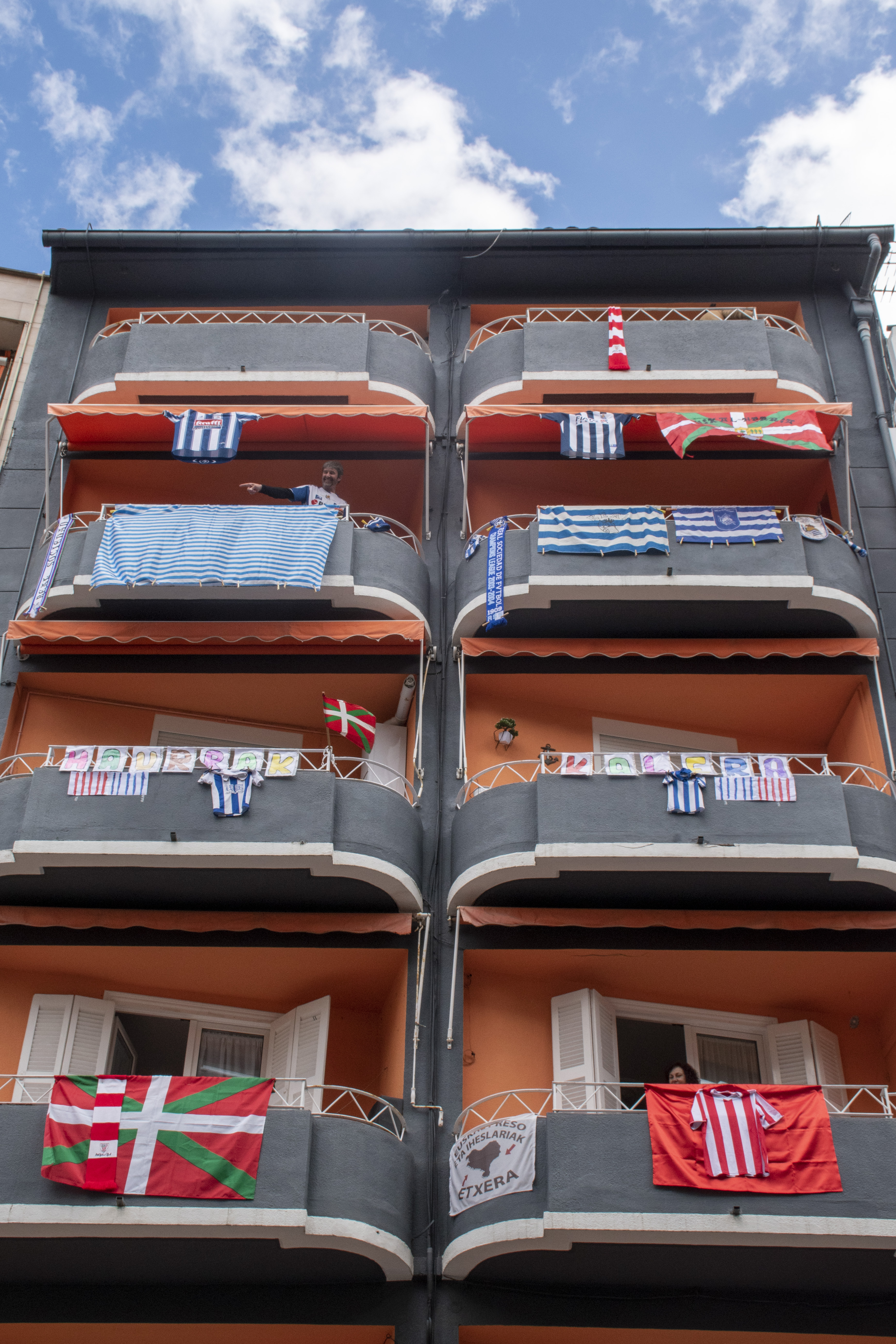 COVID-19 pandemiaren ondorioz Sevillan jokatzekoa zen Espainiako Kopako finala atzeratu zen. Banderak Zarauzko balkoietan, hasieran jokatu behar zen egunean.